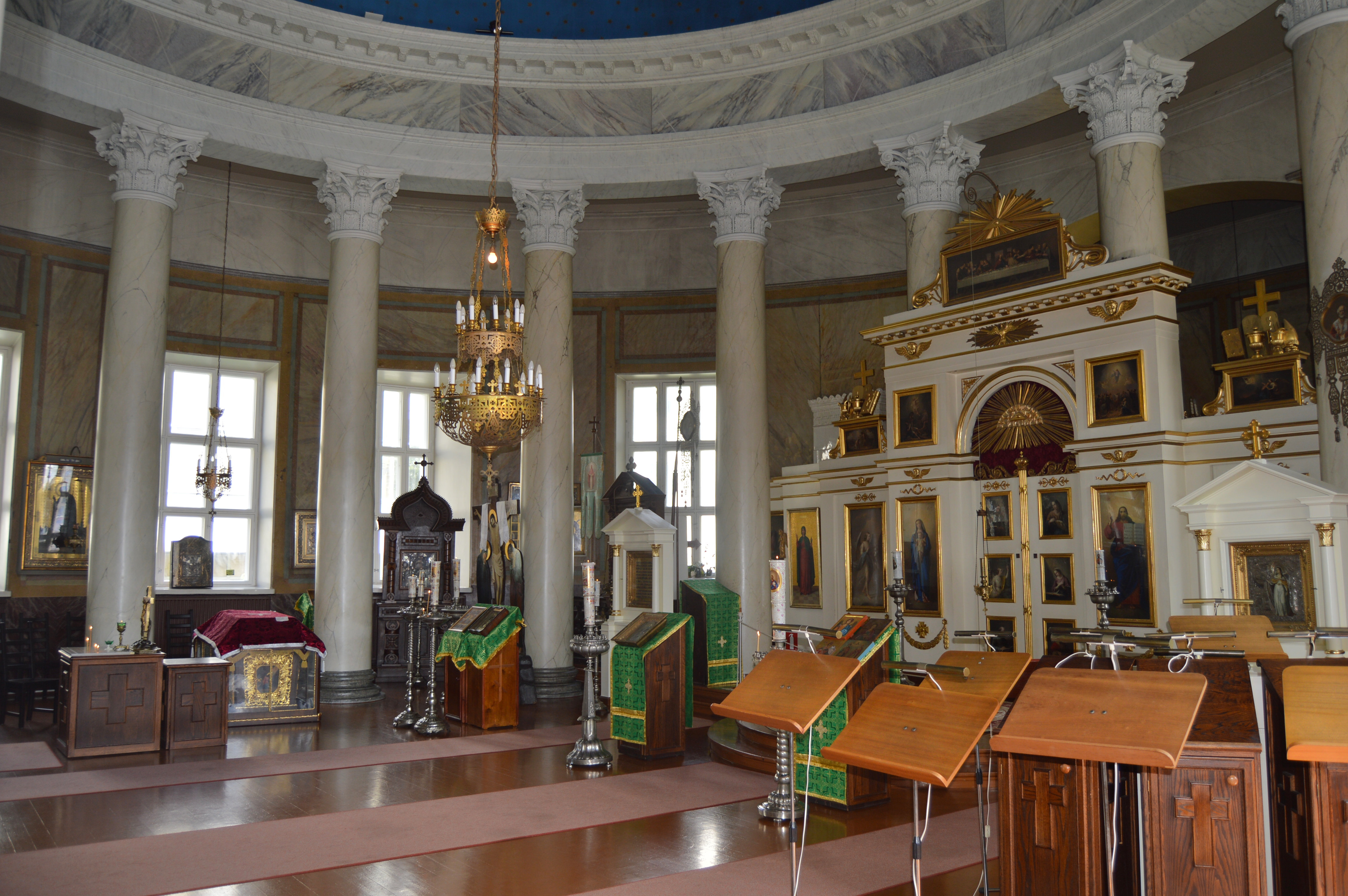 Turun ortodoksinen kirkko sisältä.